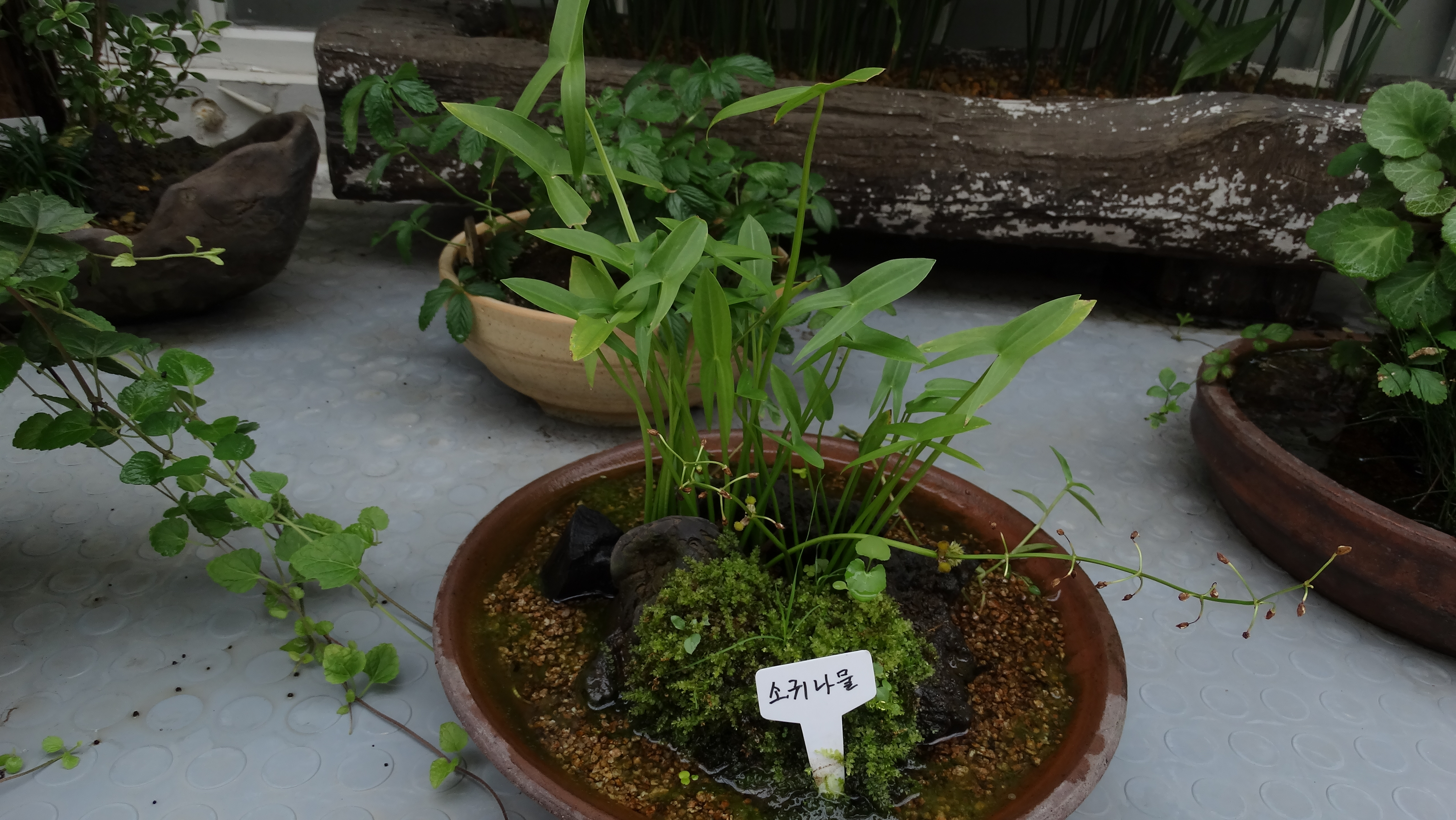 소귀나물(1)